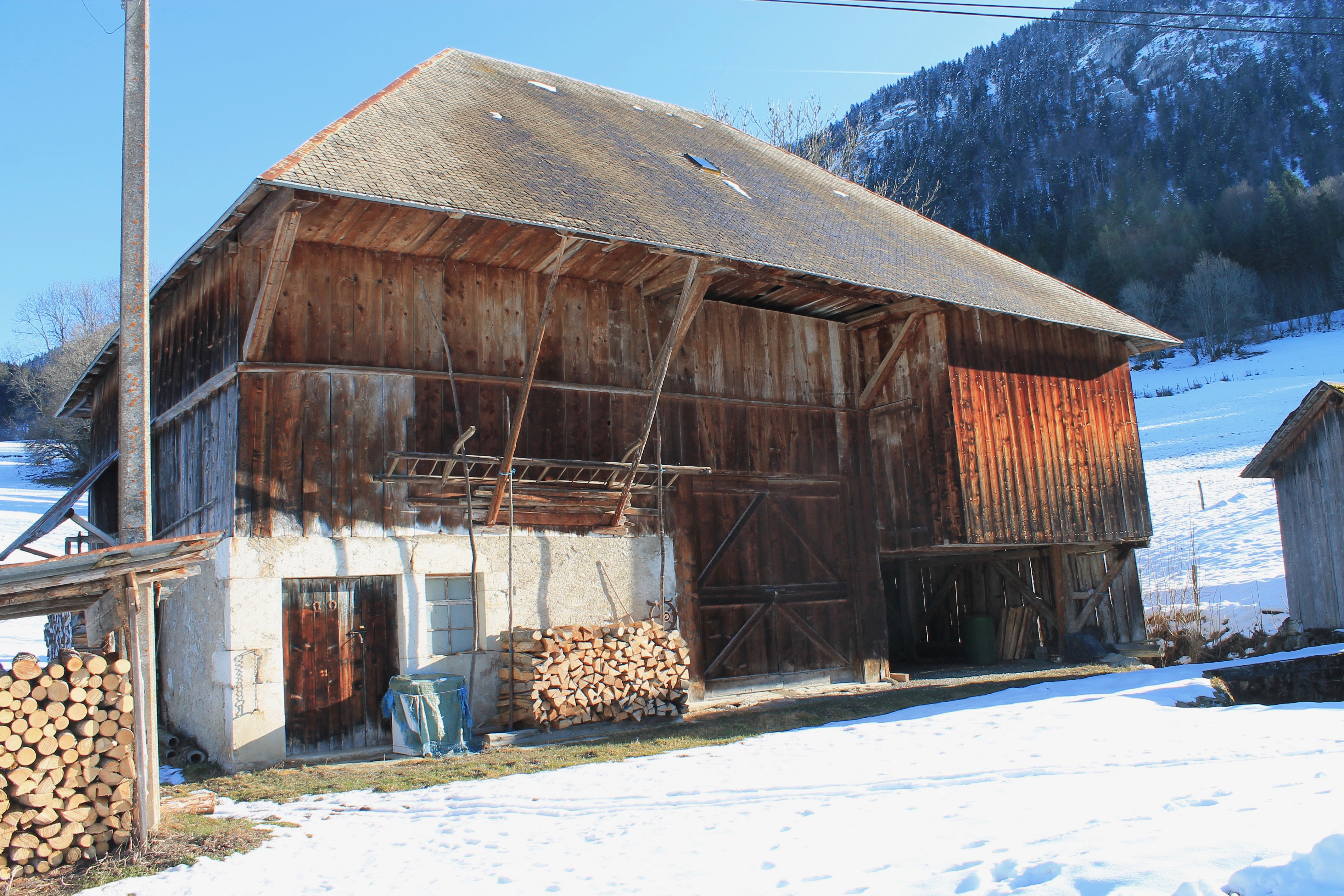 Vieille ferme à Mont Devant, Bellecombe-en-Bauges (Savoie)